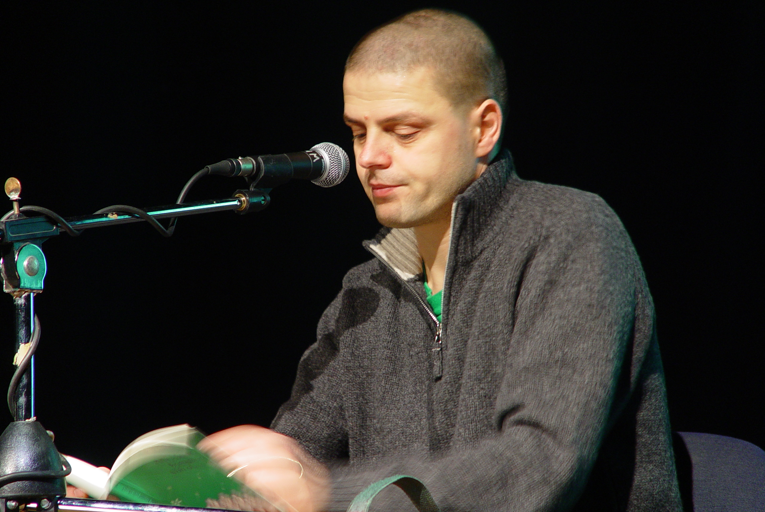 Falko Hennig am 19. Dezember 2004 im Theaterhaus Mitte (Berlin)